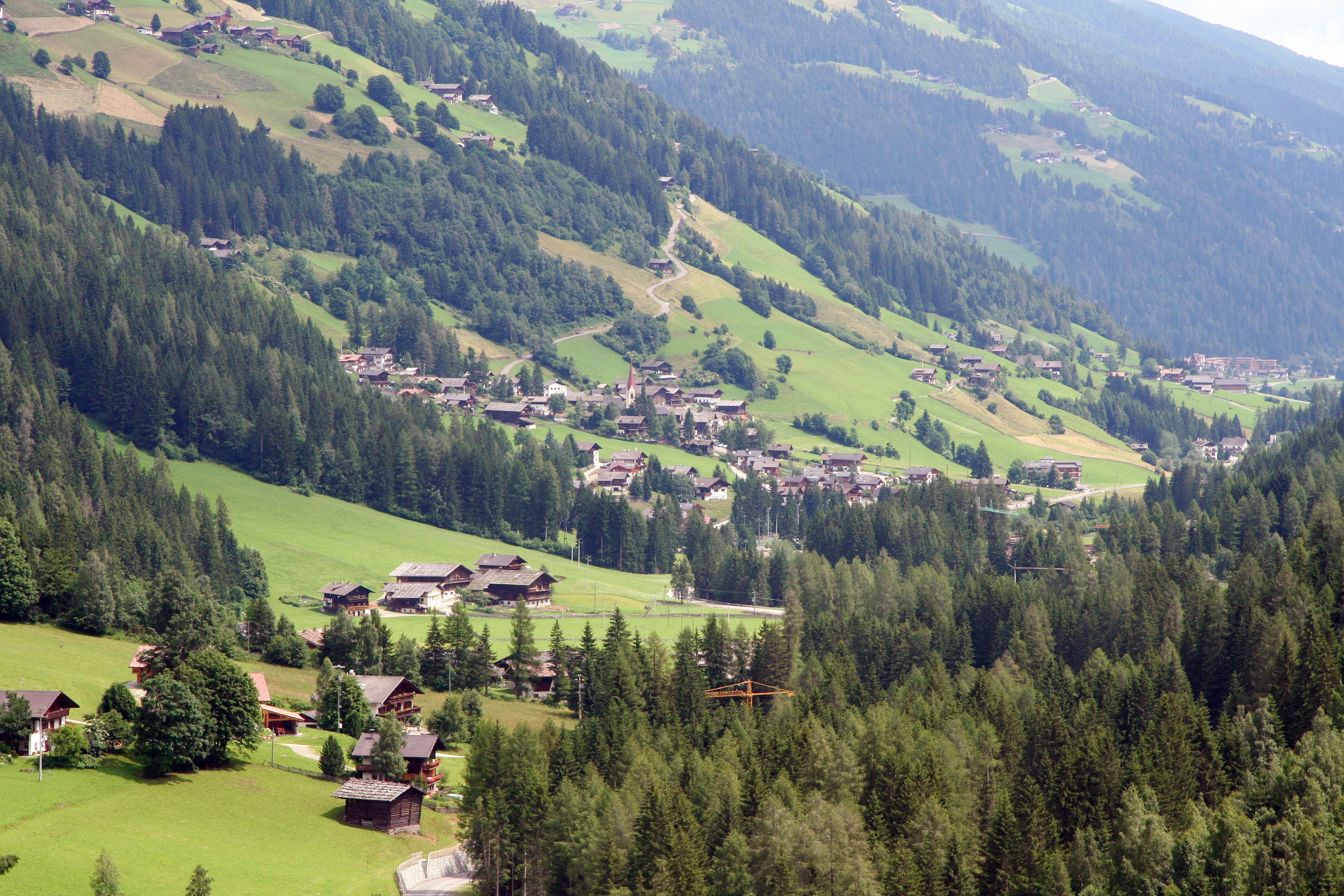 Ansicht von St. Nikolaus, Ortsteil der Gemeinde Ulten (Südtirol)